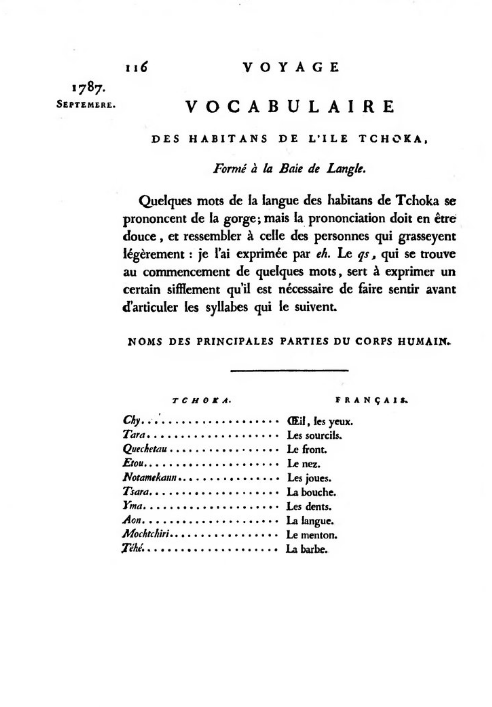 La Pérouse - Voyage de La Pérouse, Tome 3, page 116 ː vocabulaire des habitants de l'île Tchoka. Formé à la Baie de Langle. Noms des principales parties du corps humain.